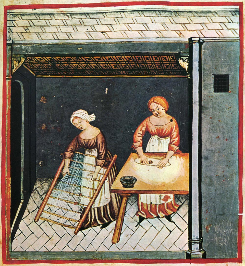 Tacuina sanitatis (XIV century) -alimenti, pasta,Taccuino Sanitatis, Casanatense 4182.